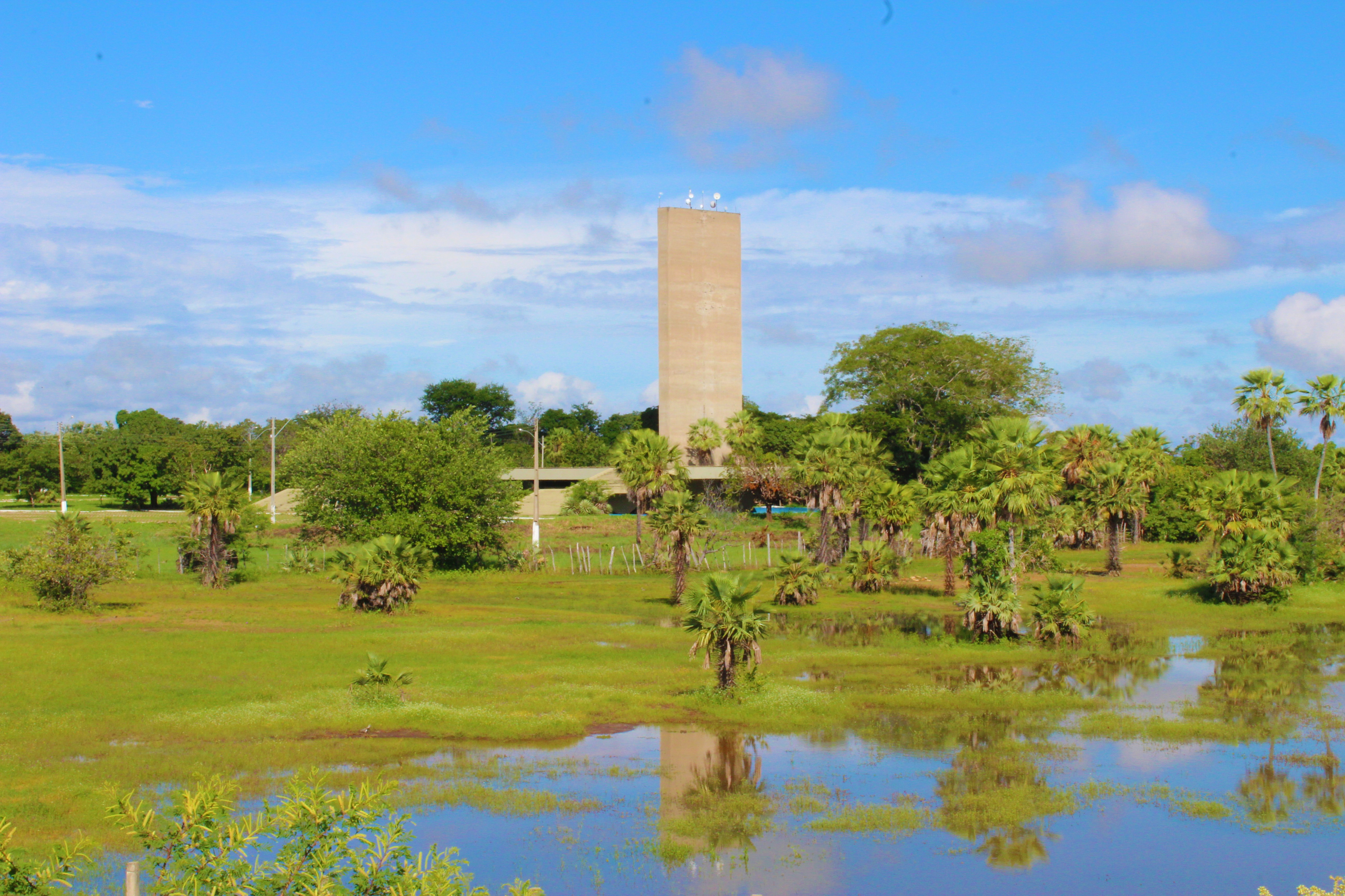 Vista do Monumento da Batalha do jenipapo na beira do rio que tem o mesmo nome.